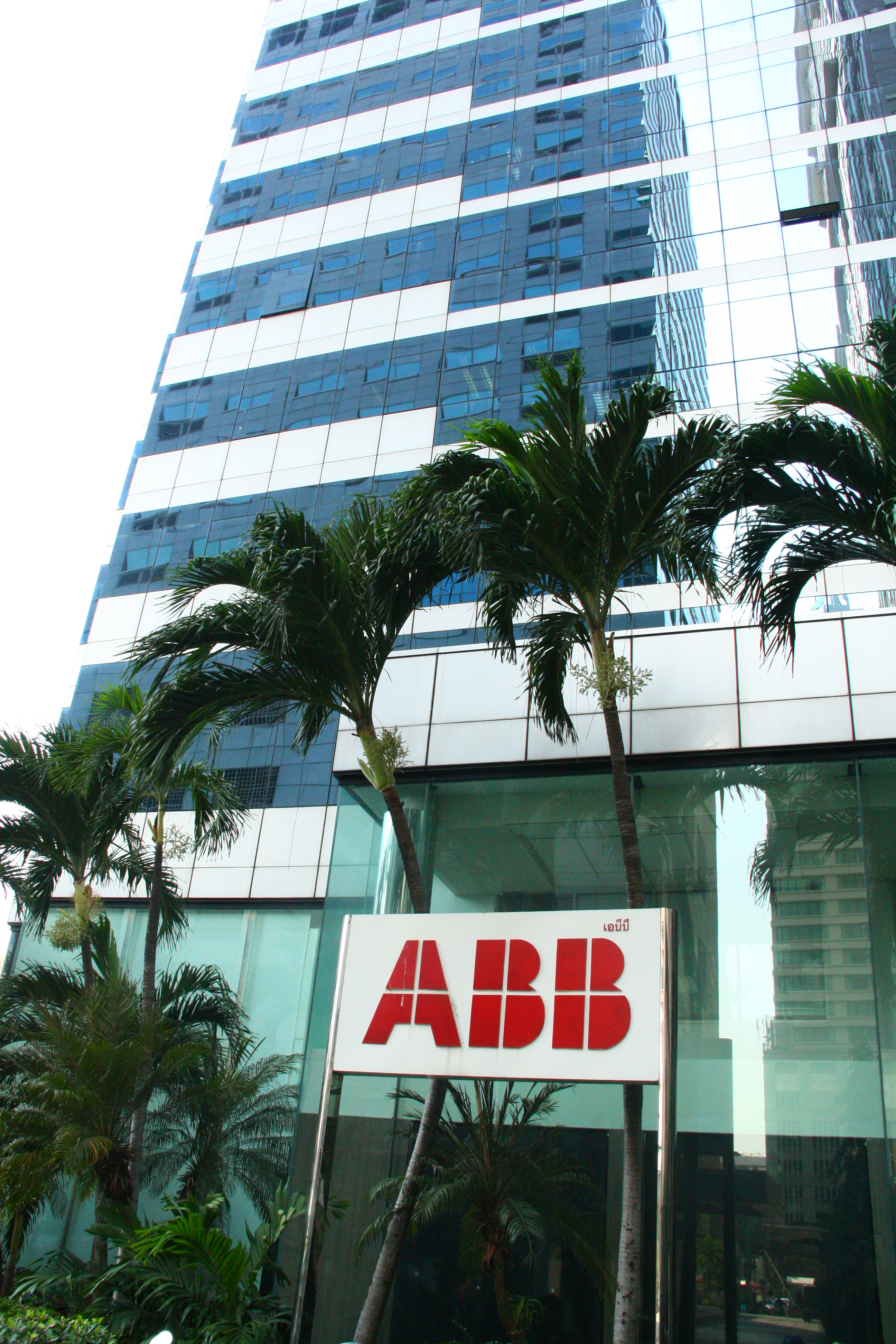 สำนักงานใหญ่เอบีบีประเทศไทย